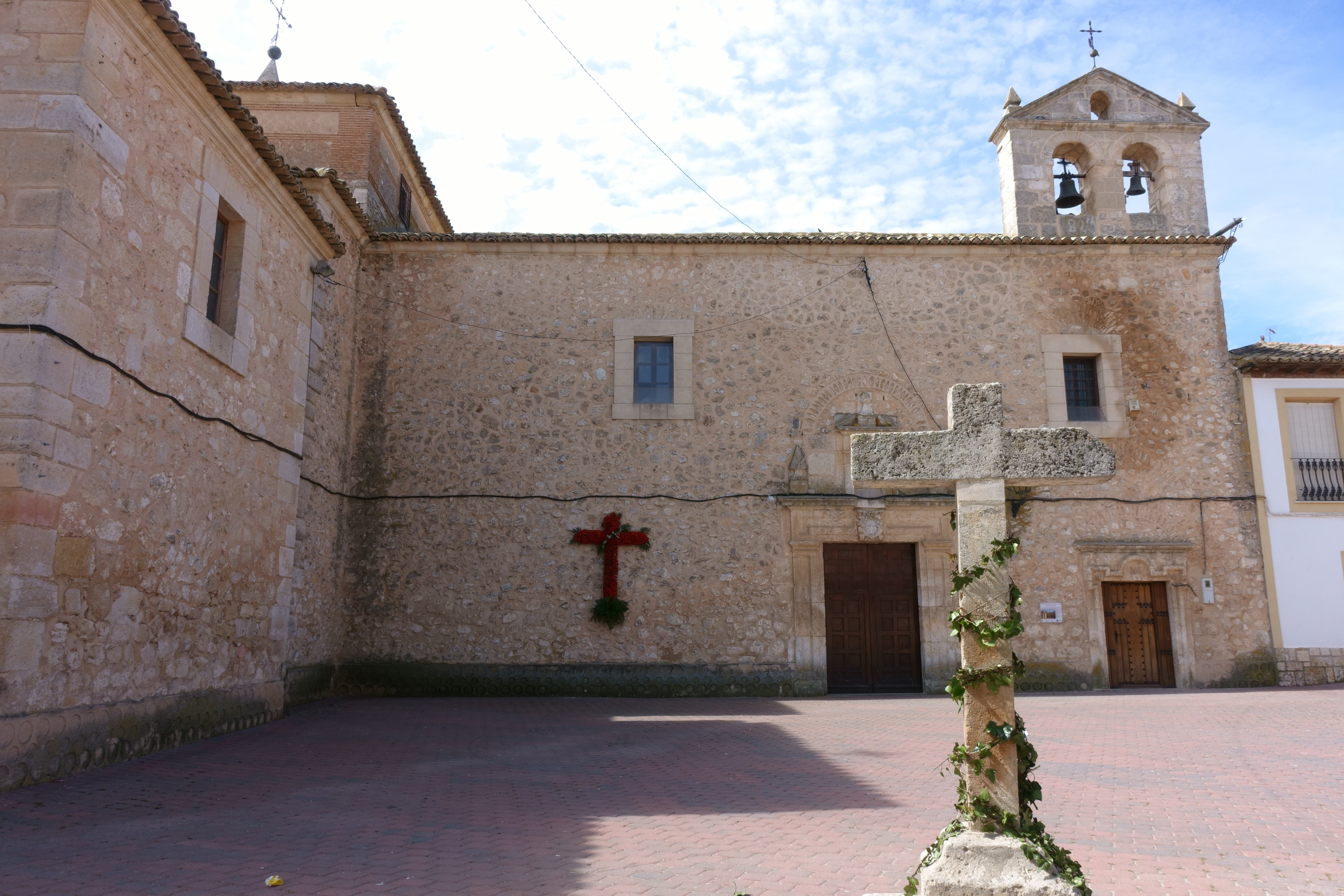 Convento de las Carmelitas, en La Alberca de Záncara (Cuenca, España).